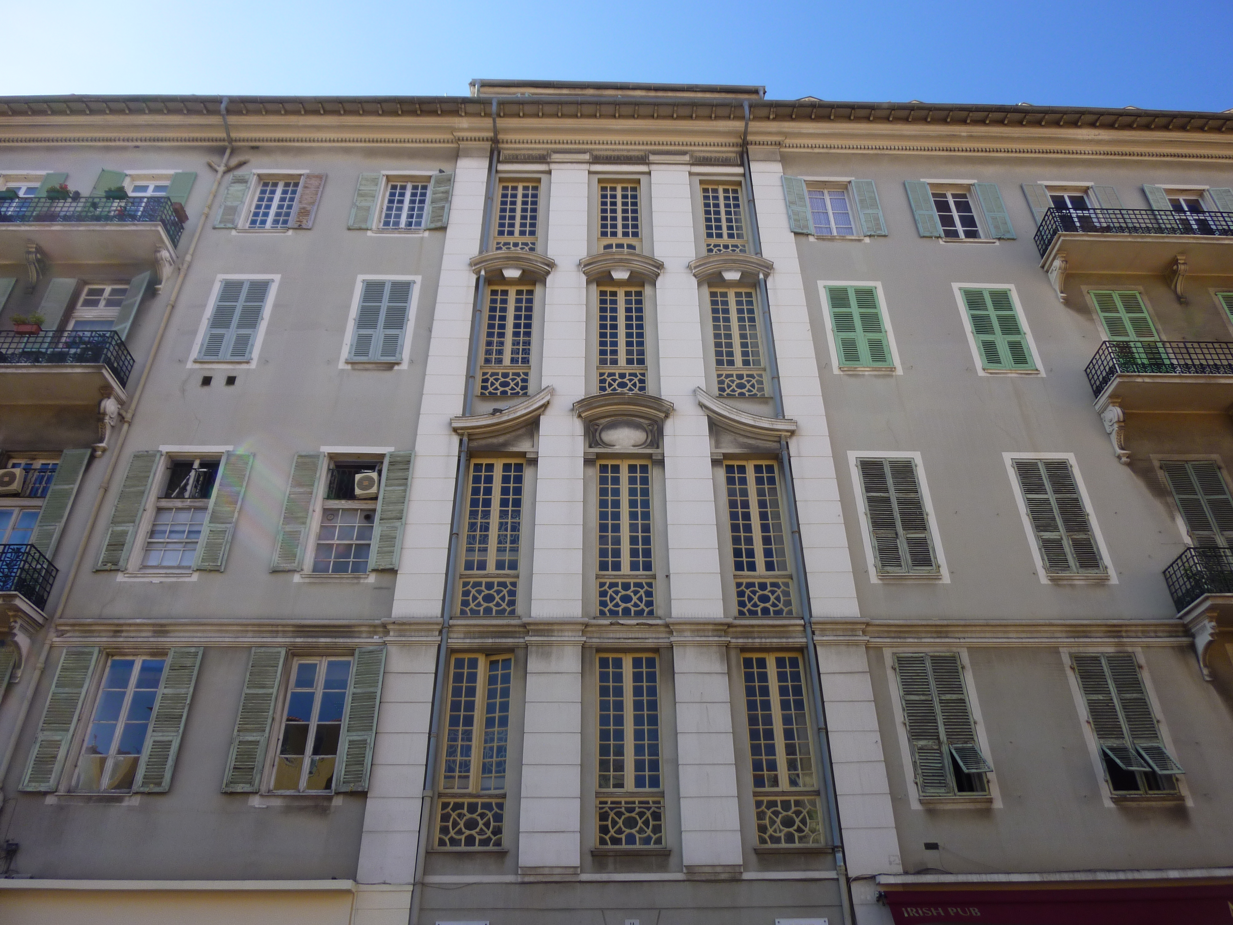 Palais Hongran, (Nice, Alpes-maritimes, France)